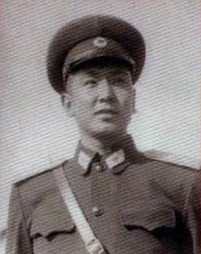 王海1955年获中校军衔